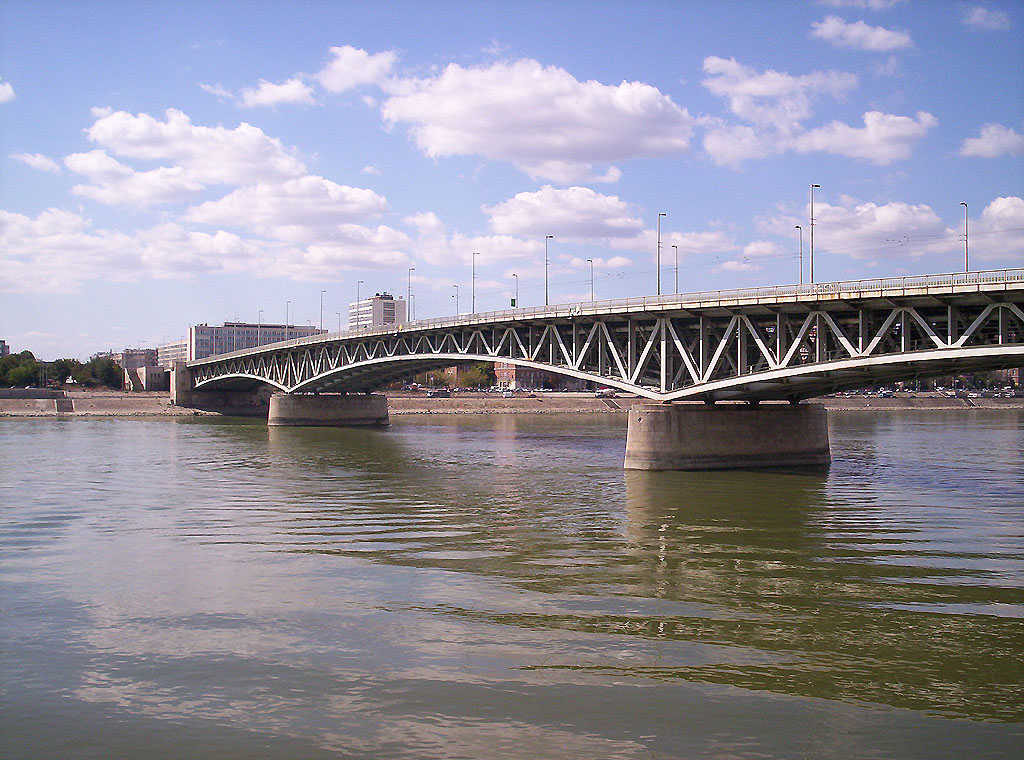 Budapest, Petőfi híd